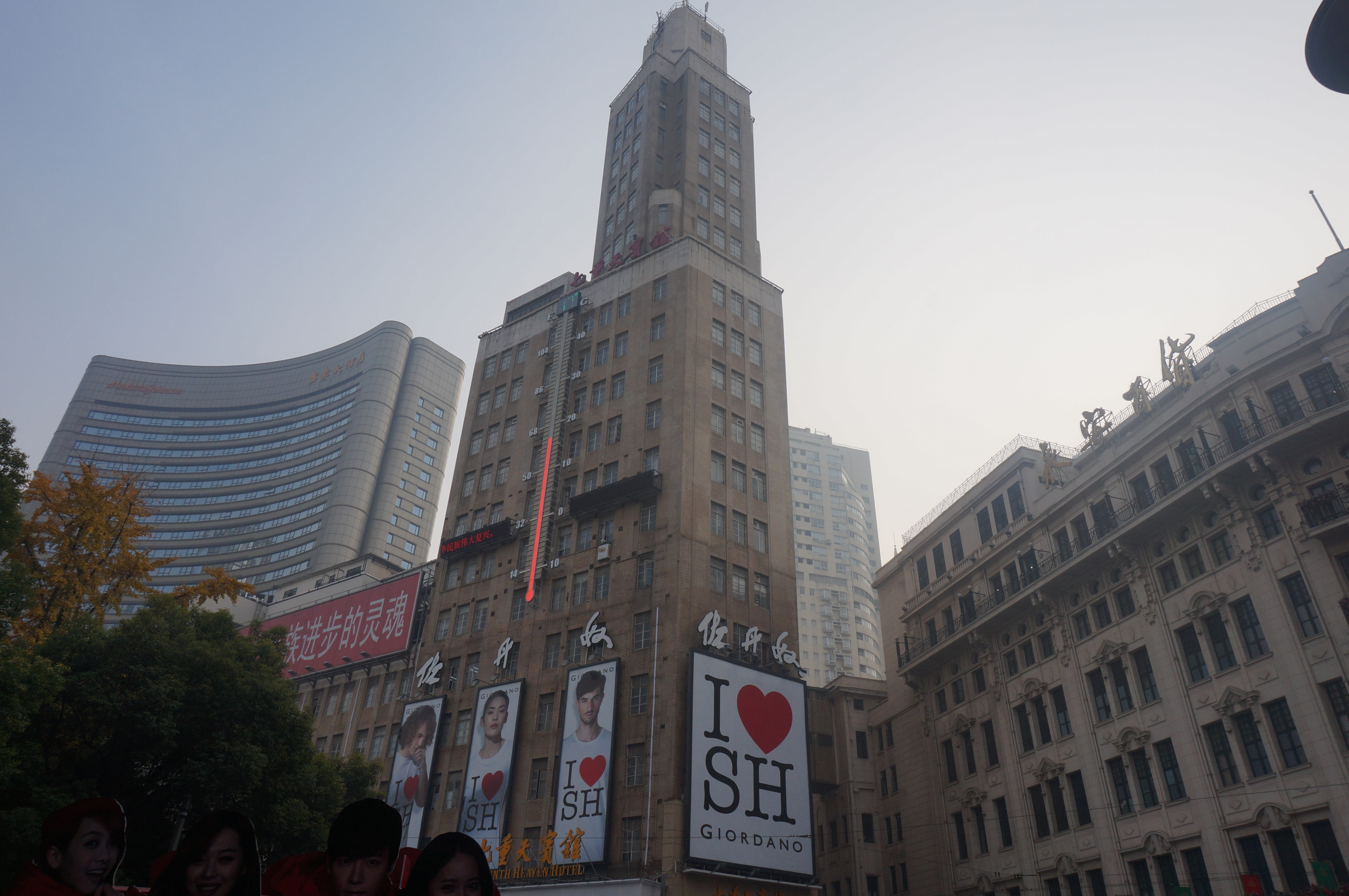 上海新老永安大楼